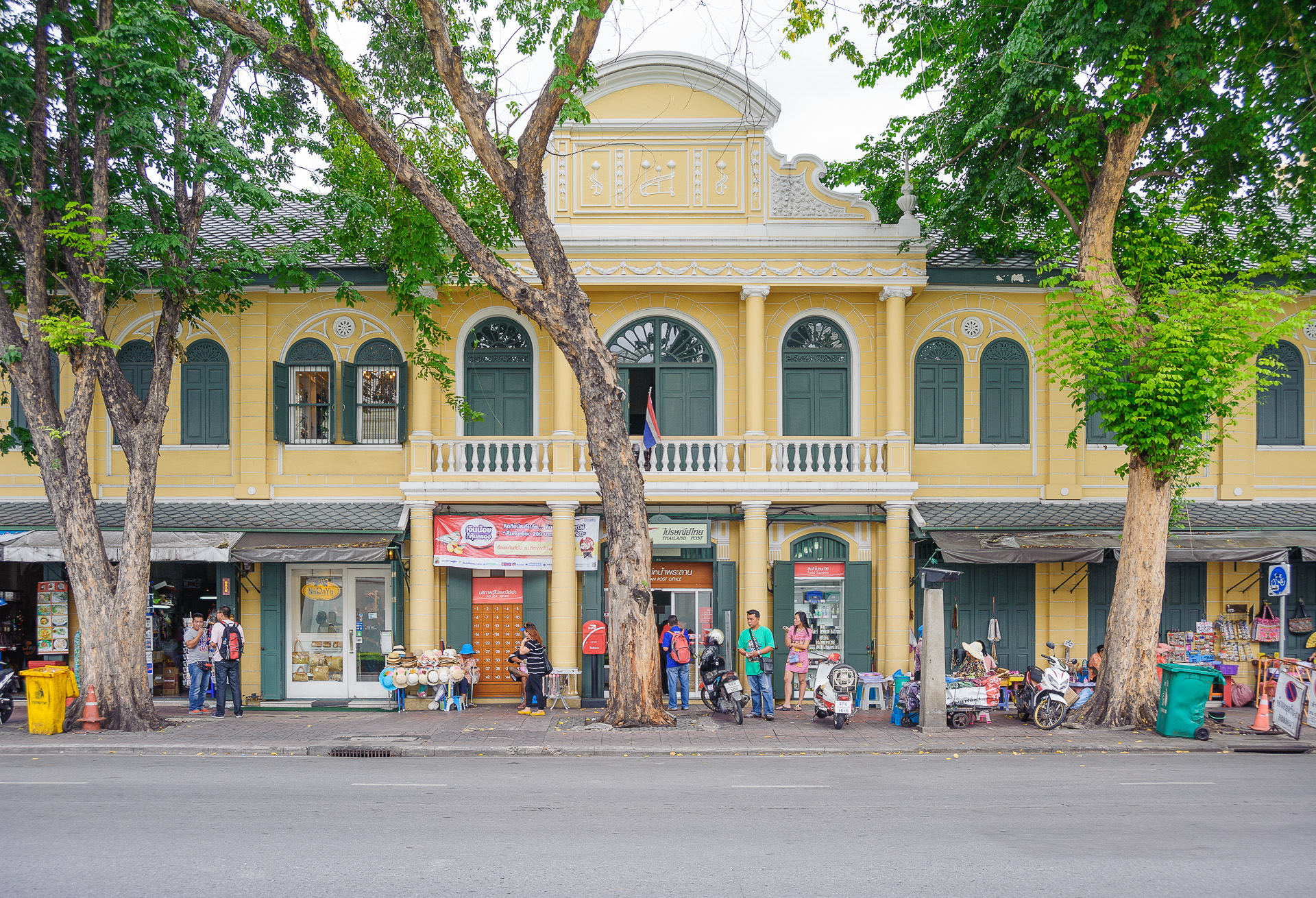 ตึกแถวริมถนนหน้าพระลาน